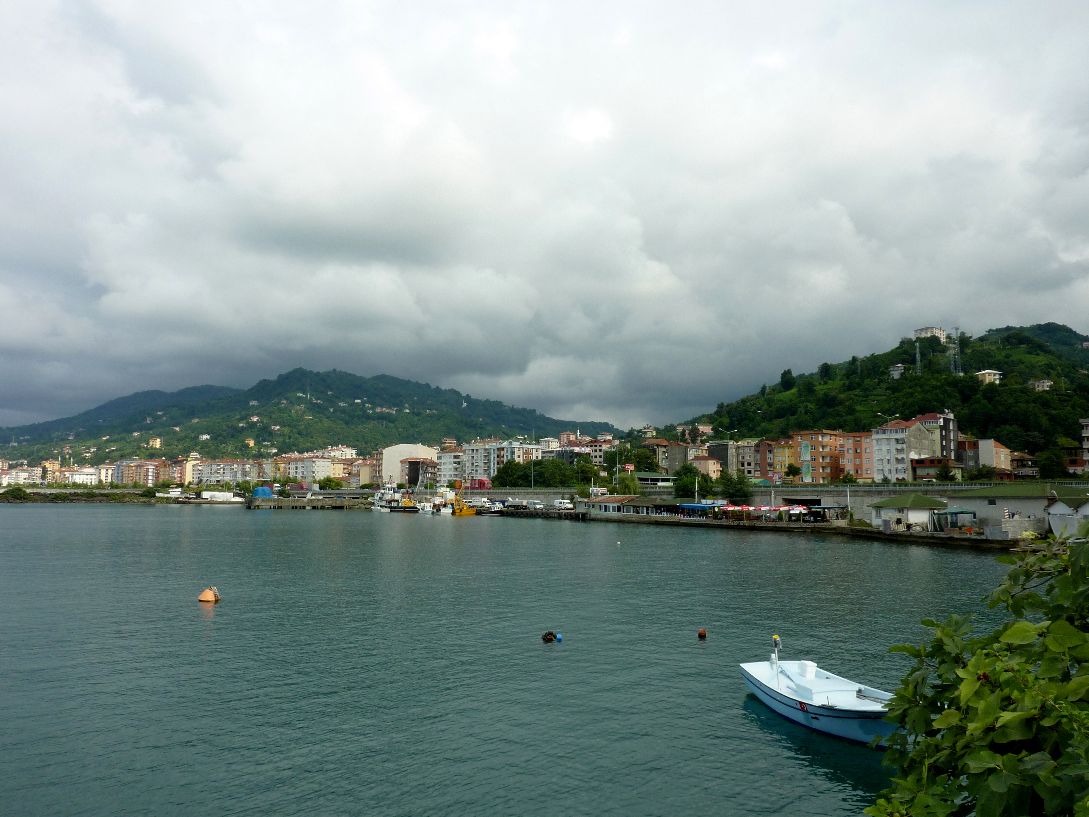 Çayeli